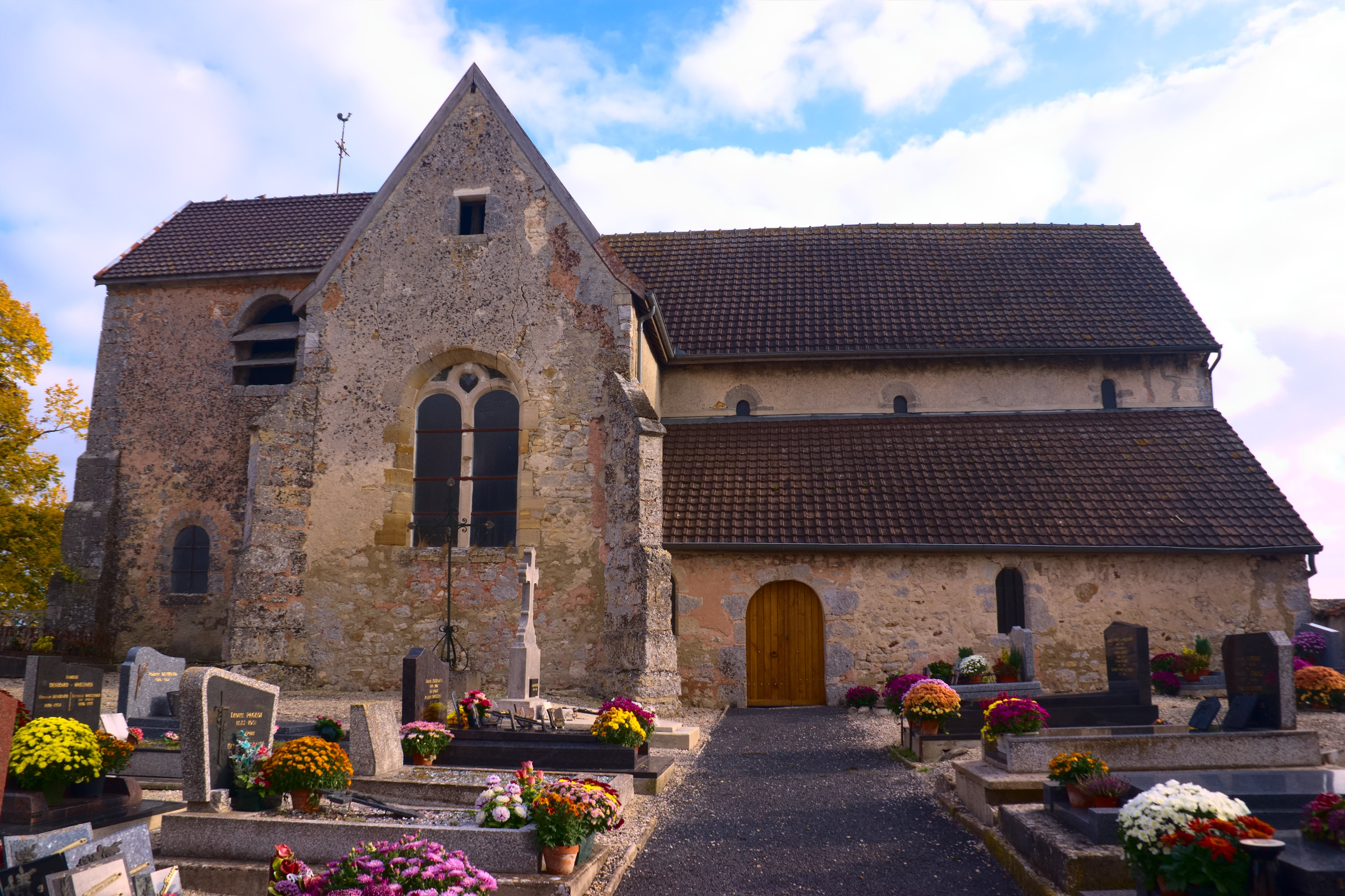 L'église de Trécon (Marne, France)